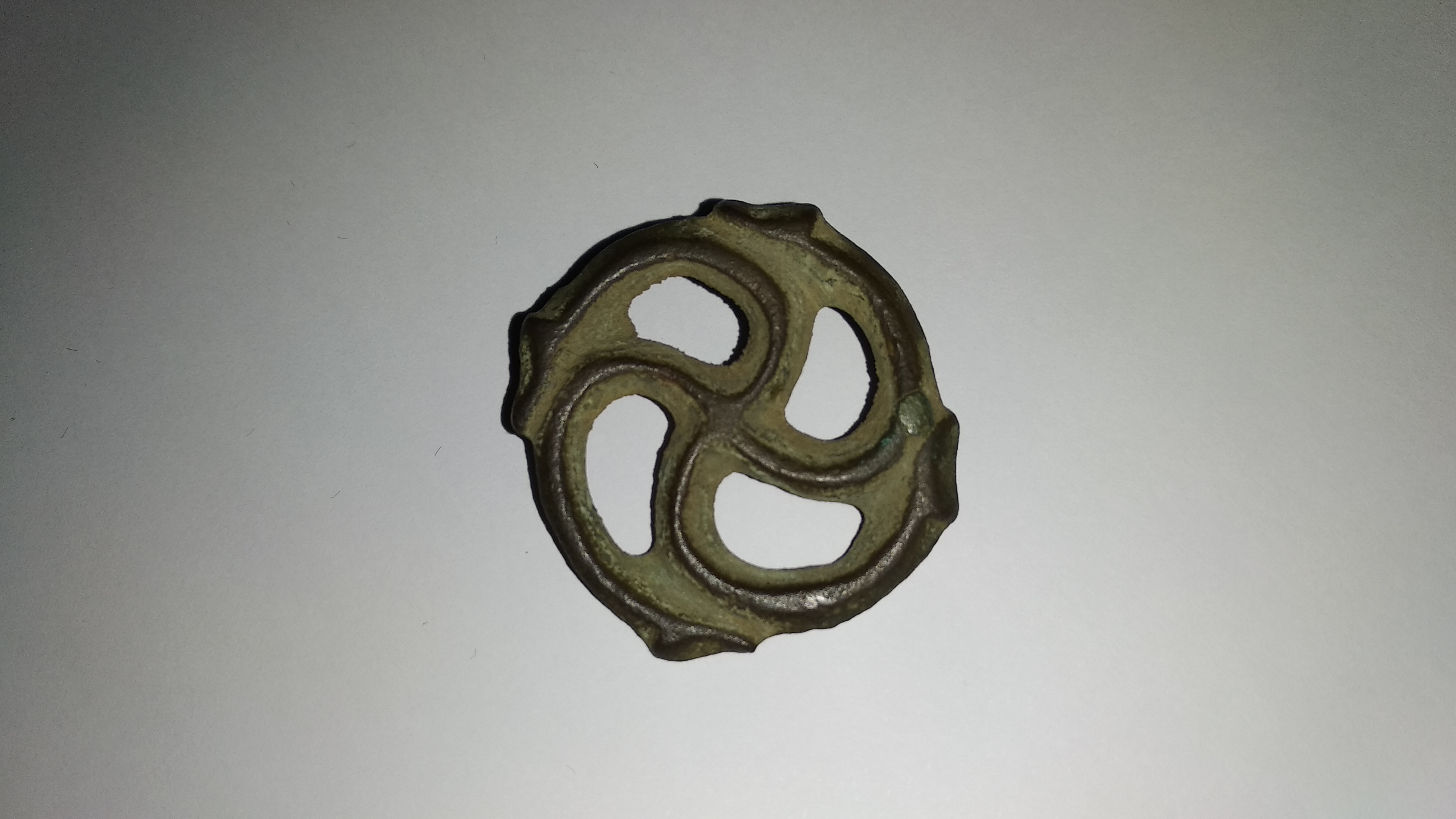 Aukšktkiemių kaimo apylinkėse Vaido Lekstučio rasta segė.